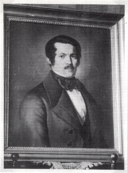 Foto aus Familienbesitz, das Gemälde soll aus Schweidnitz stammen